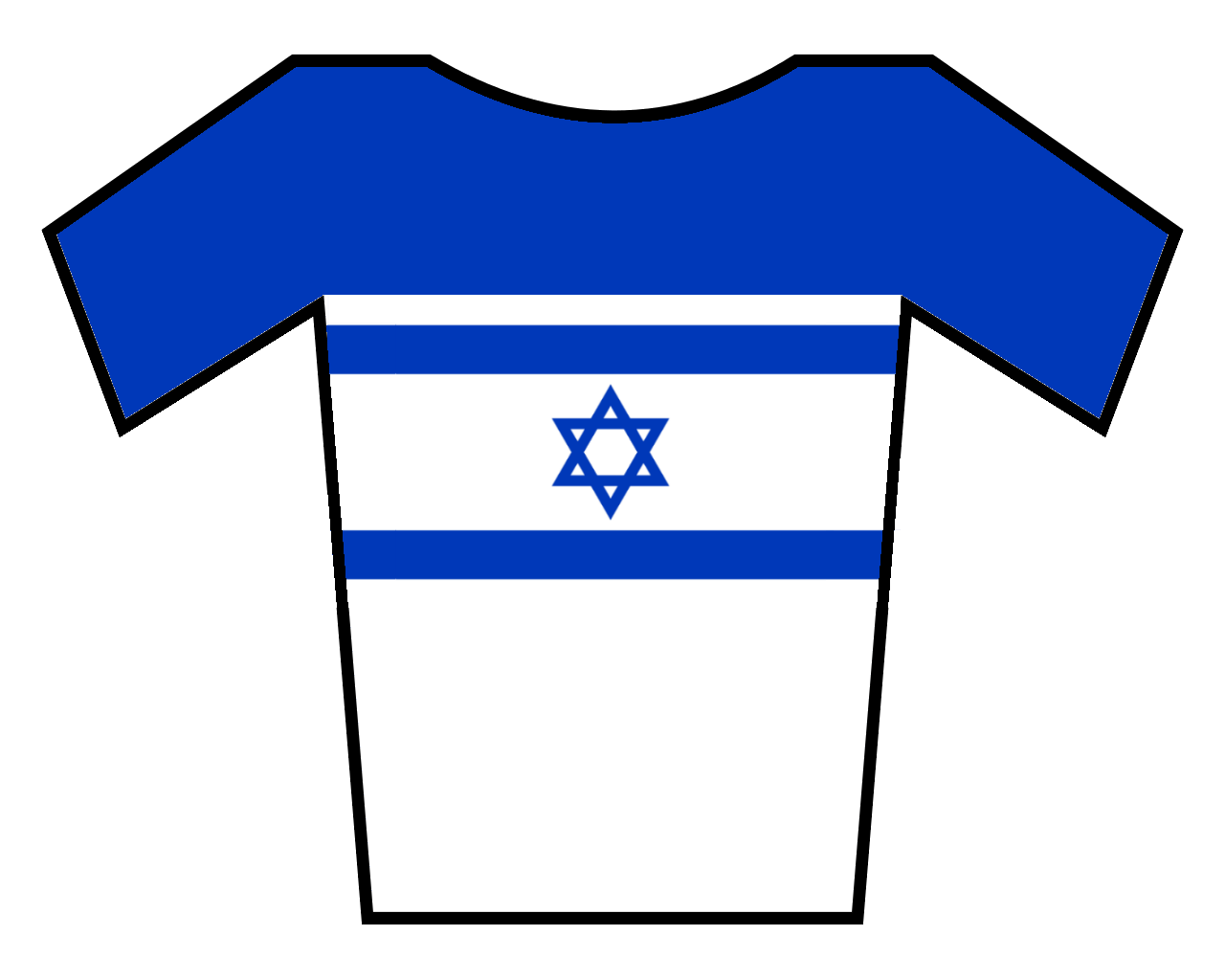 דגל ישראל ברכיבת אופניים